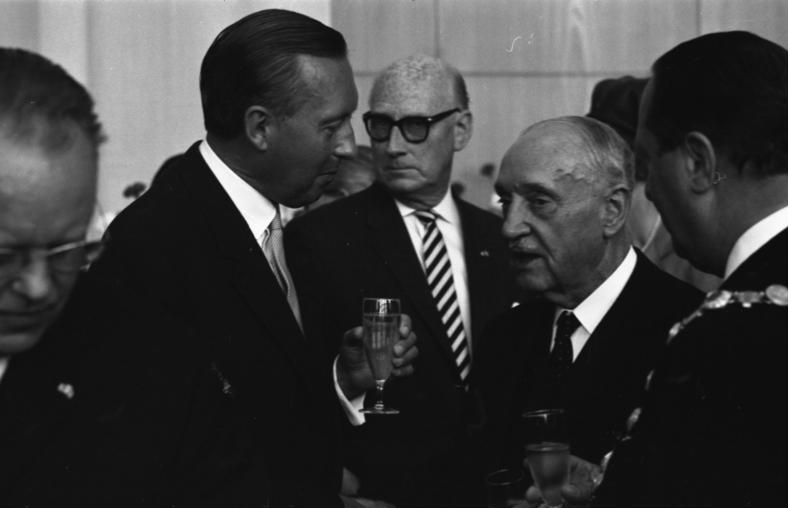 Staatsbesuch des Bundespräsidenten von Österreich Dr. Adolf Schärf. Rathaus Köln